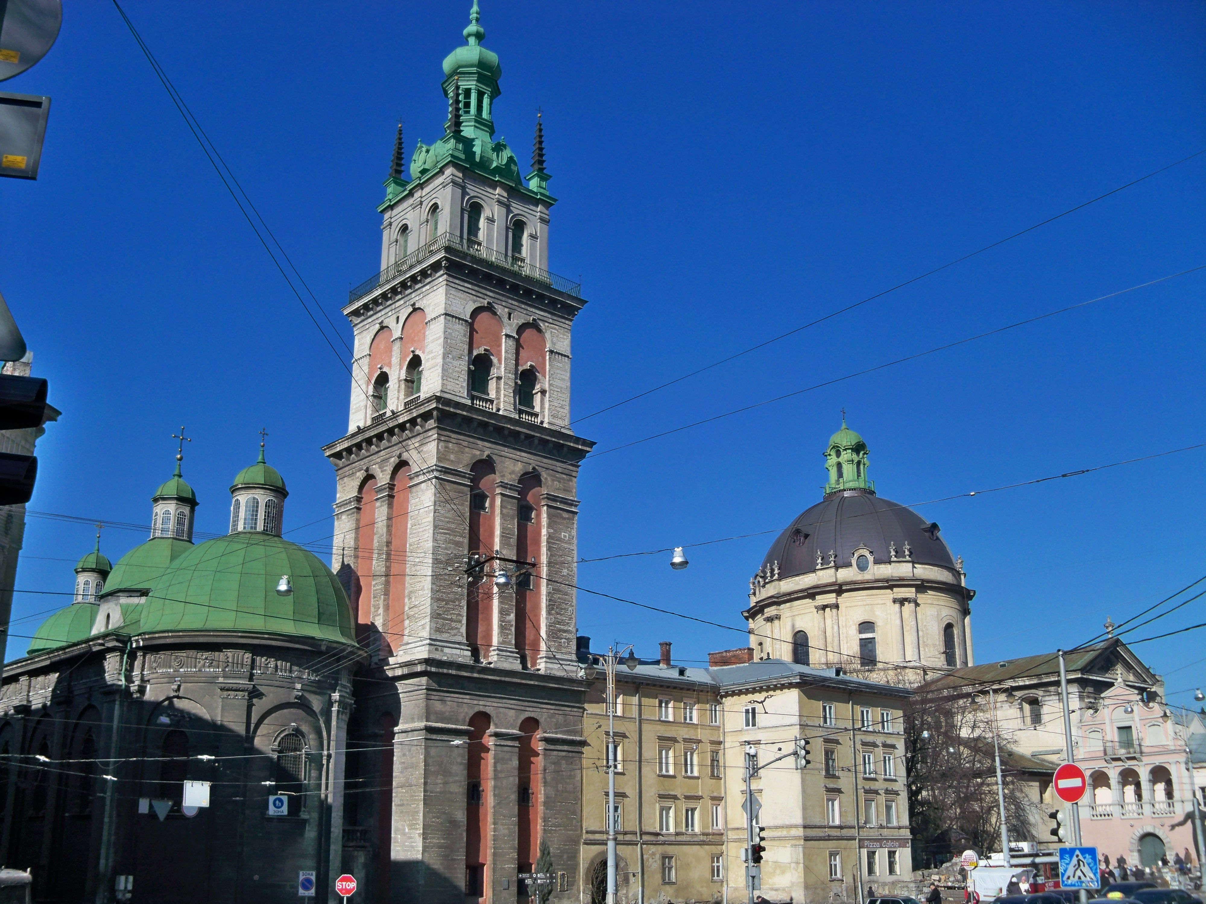 дзвіниця (Вежа Корнякта), Львів, Руська